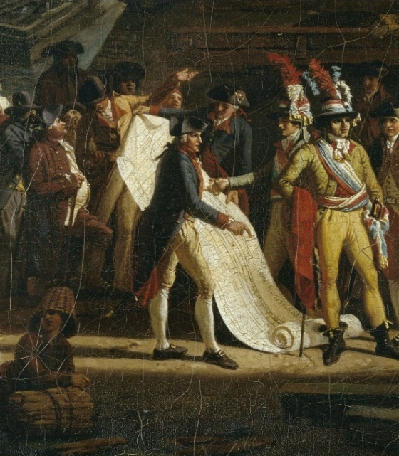 La scène représente l'ingénieur Sané déroulant le plan de l'un de ses vaisseaux devant Jean Bon Saint-André, membre du Comité de Salut Public et envoyé spécial de la Convention à Brest de 1793 à 1794. Détail d'un tableau de Jean-Fançois Hue.